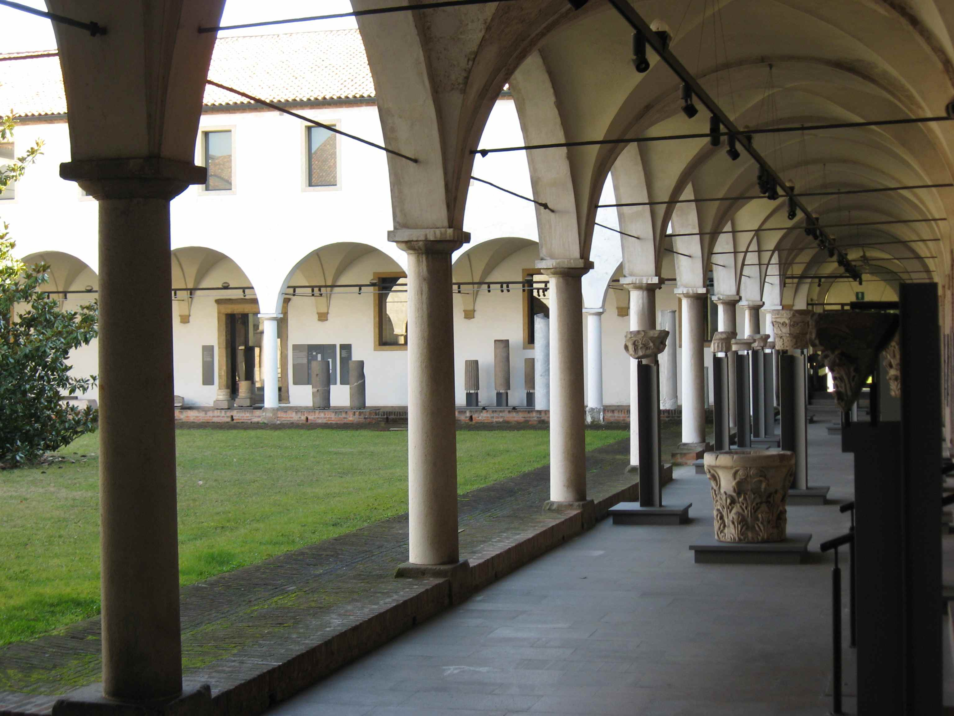 Chiostro dei Musei civici degli Eremitani a Padova.